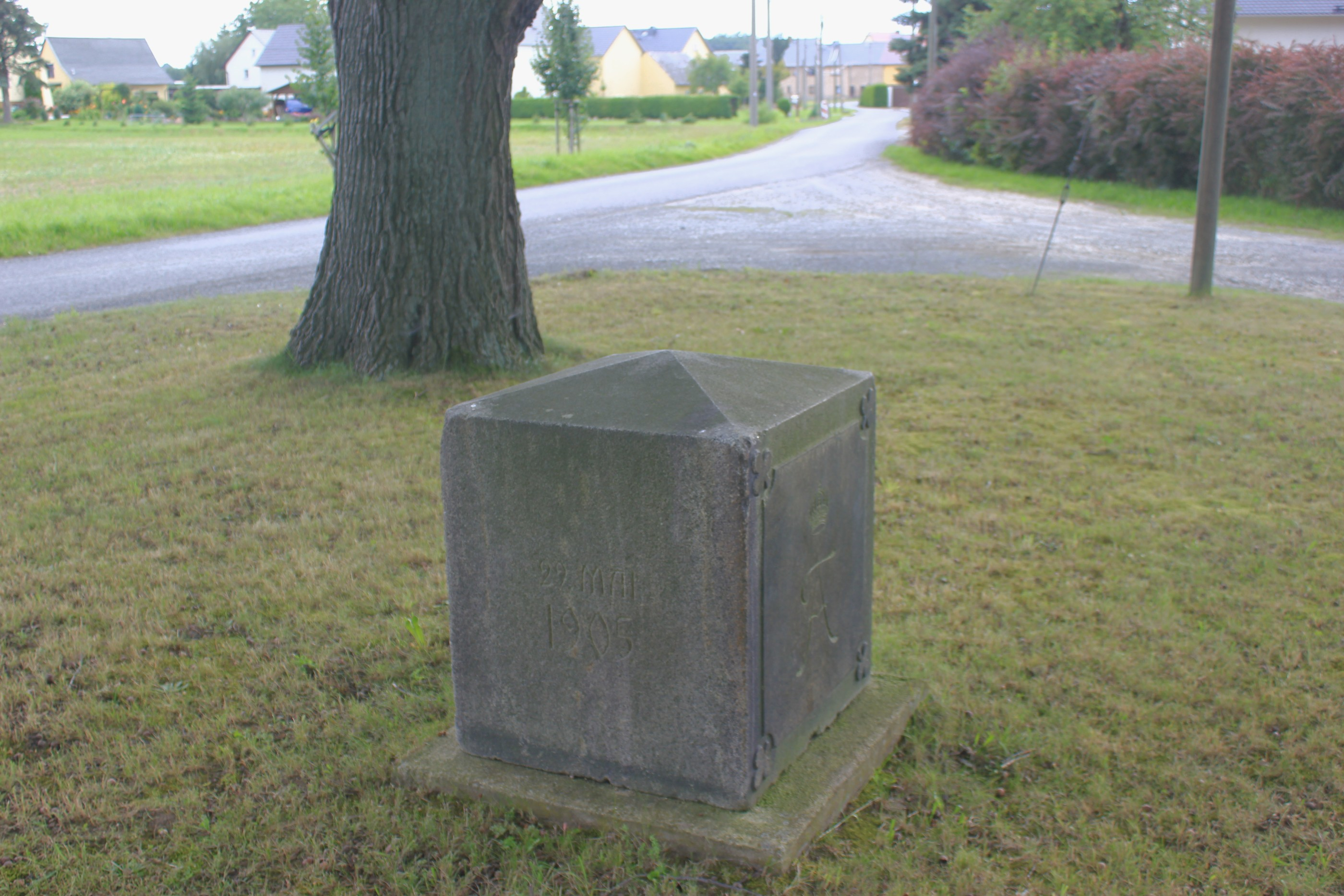 Hornjoserbsce: Pomnik kralej Bjedrichej Awgustej III. we Łusču.